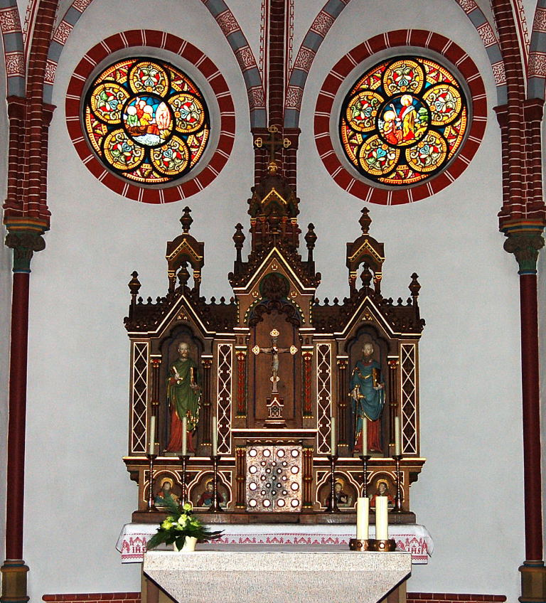 Altar der St. Petri-Kirche